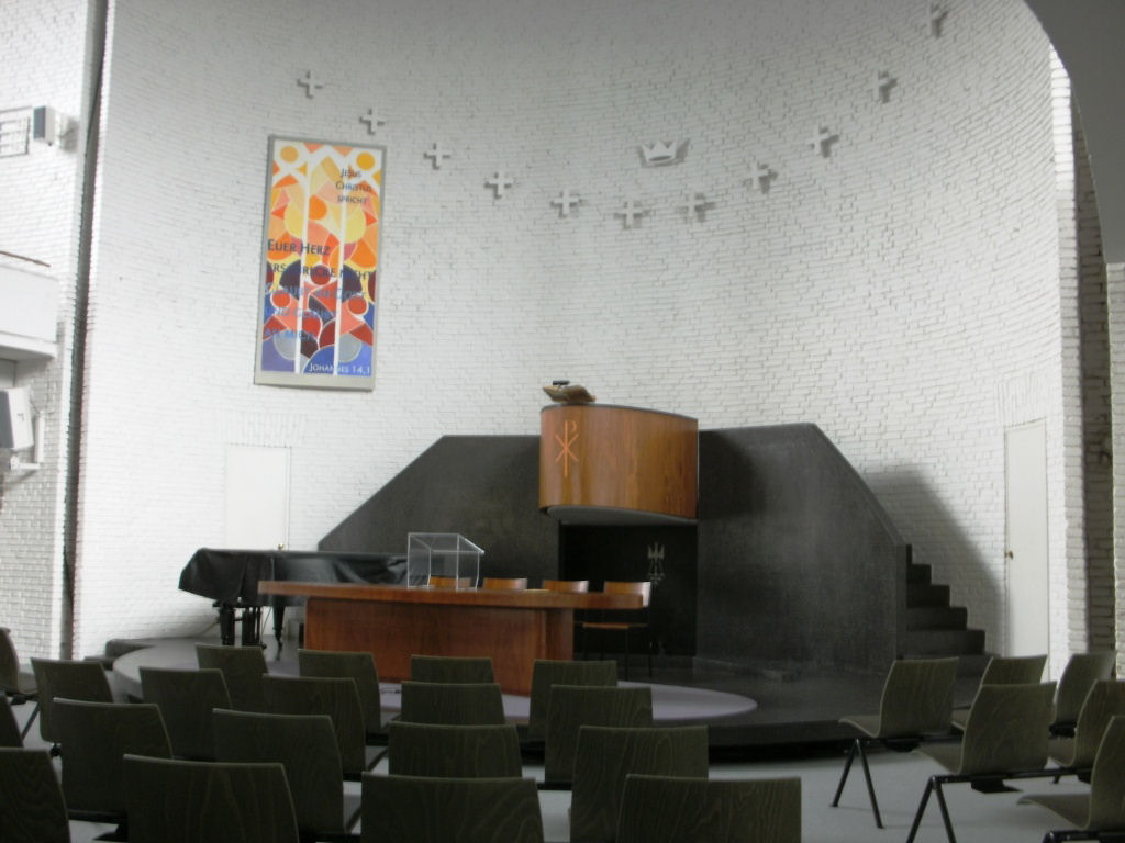 Christuskirche Altona in Hamburg, Deutschland - Evangelisch-Freikirchliche Gemeinde (Baptisten)